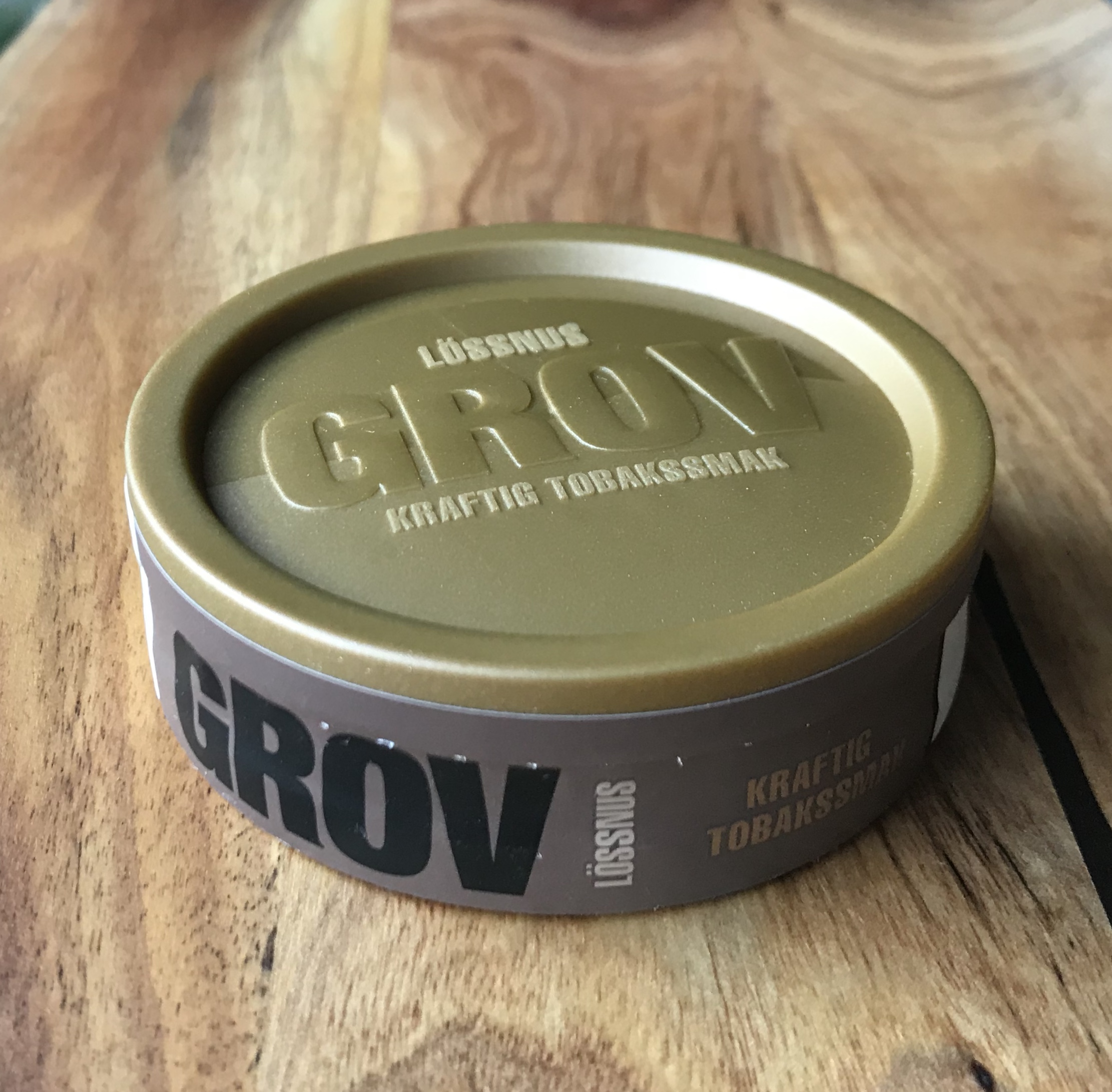 Grovsnus lös